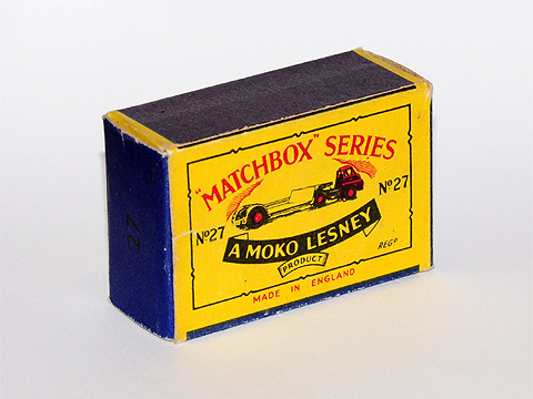 Originalschachtel des Bedford Low Loaders